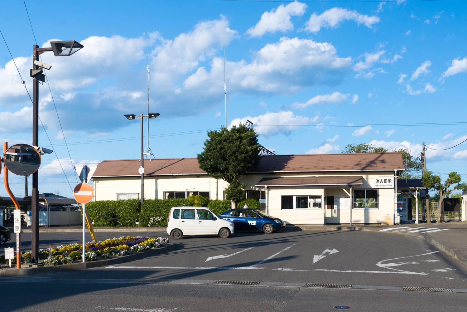 東日本旅客鉄道株式会社常磐線浜吉田駅駅舎